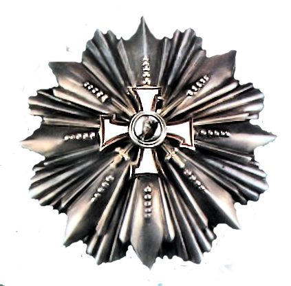 Karhuntappajain ritarikunnan suurristin rintatähti